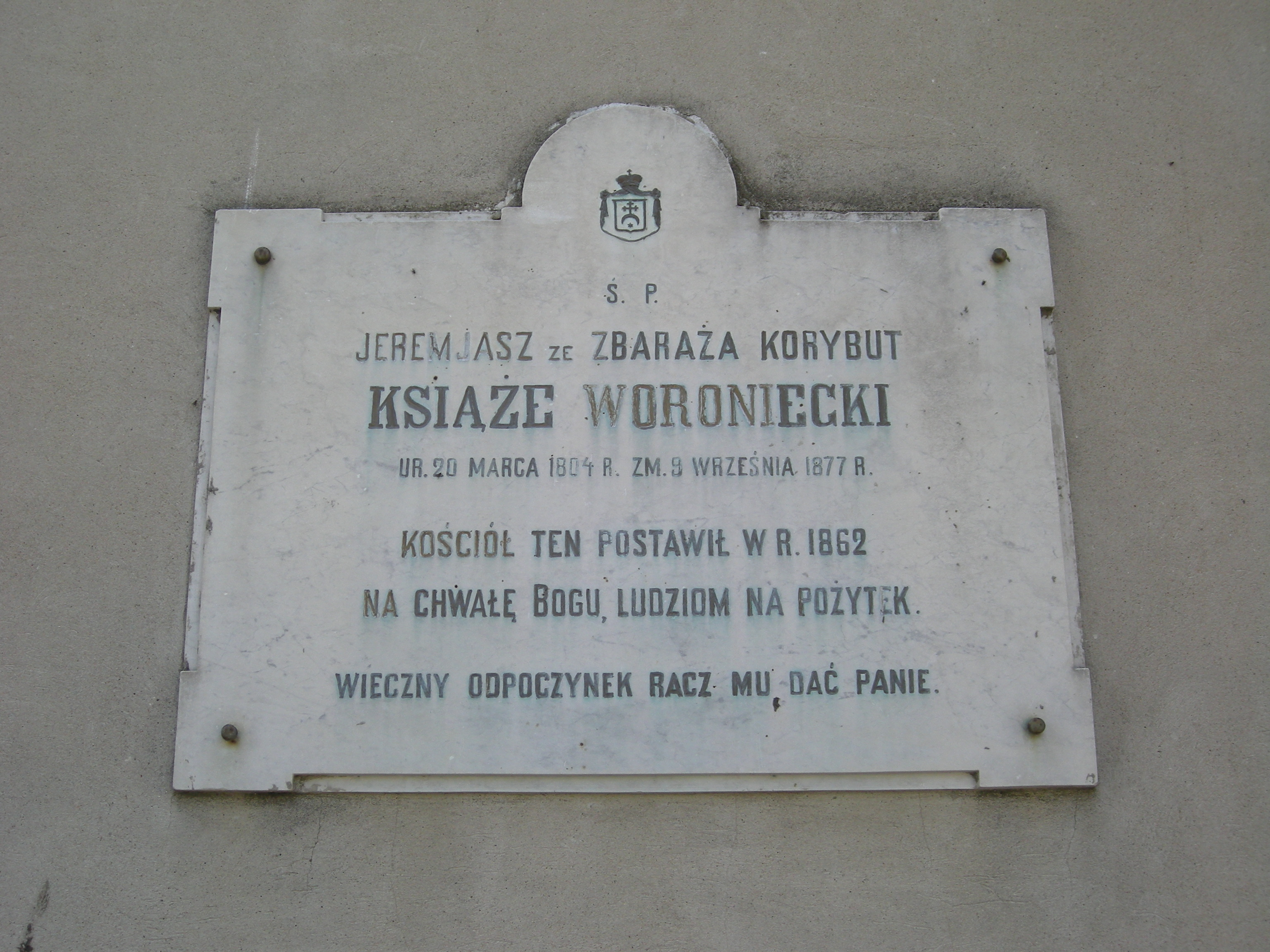 Tablica fundacyjna na kosciele parafialnym w Huszlewie.